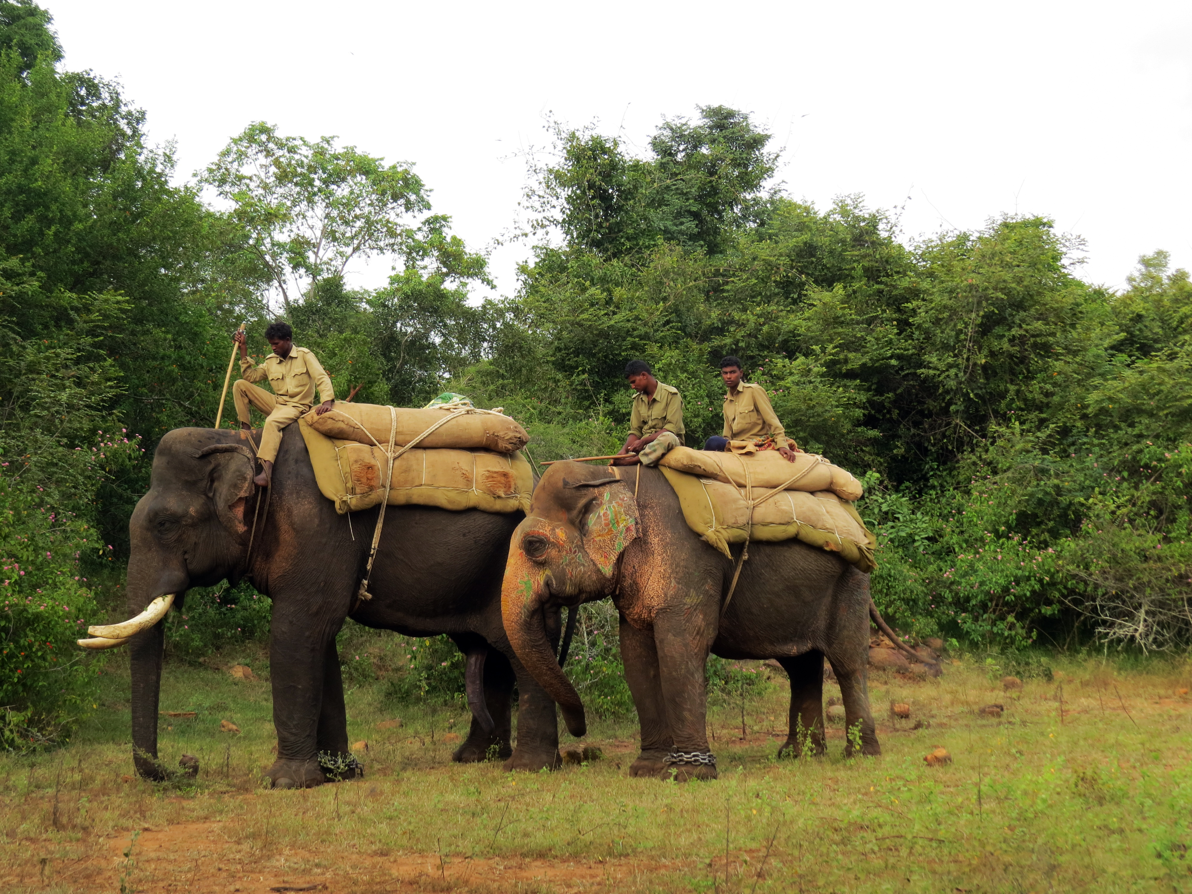 Gajendra and Durga, captive kumki elephants in India